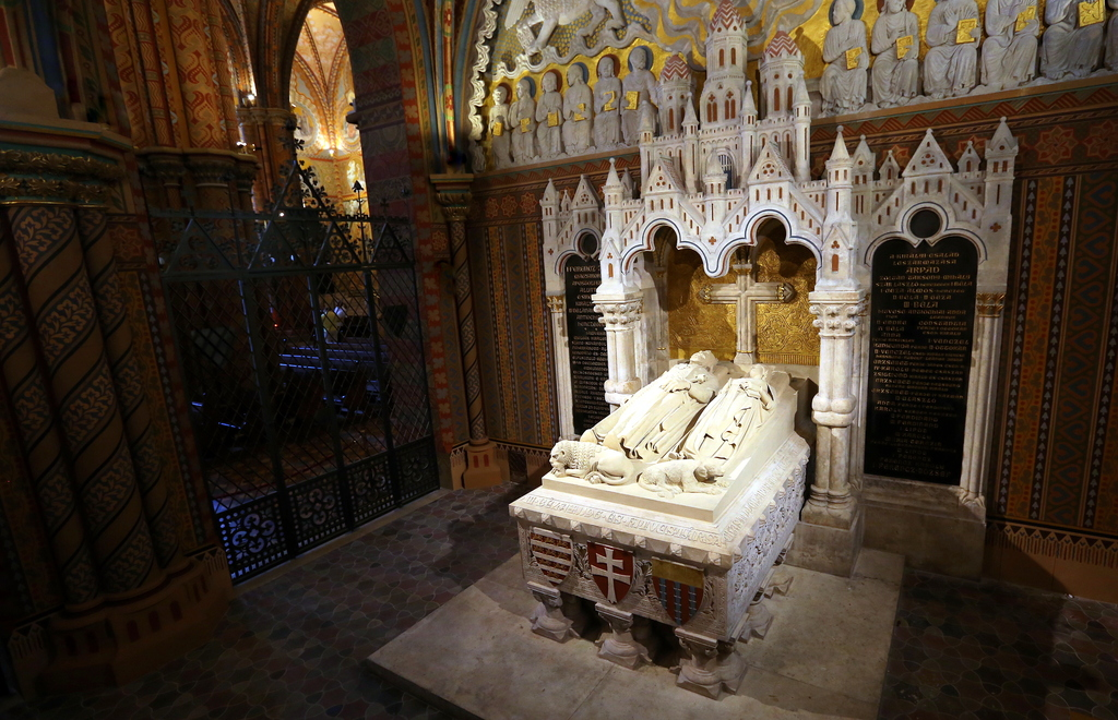 III. Béla sírja a Mátyás-templomban